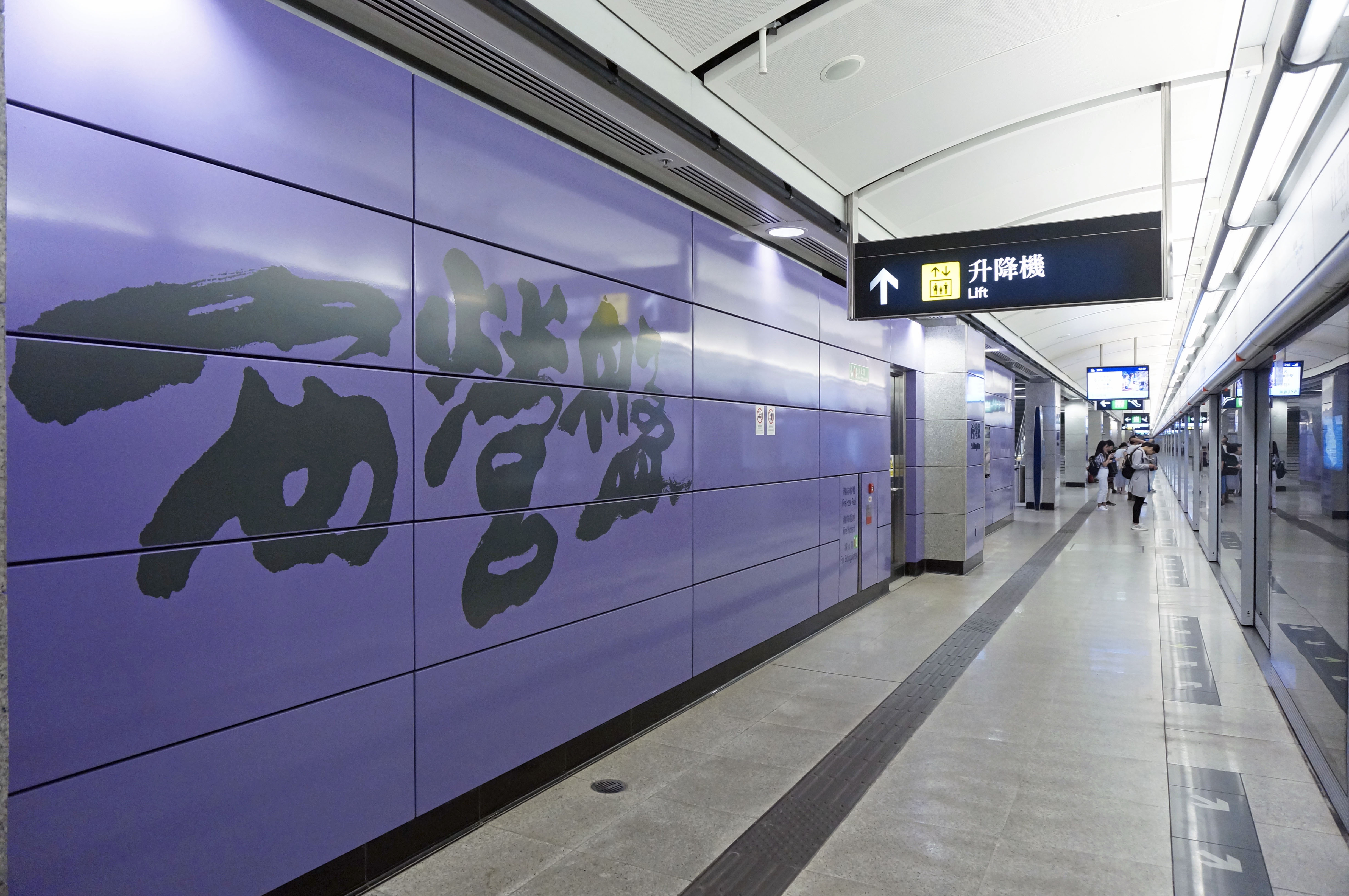 港鐵西營盤站月台